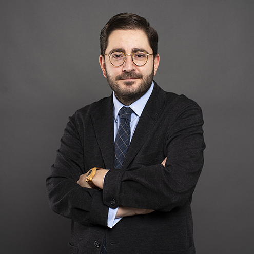 Manuel Muñiz, Secretario de Estado de la España Global